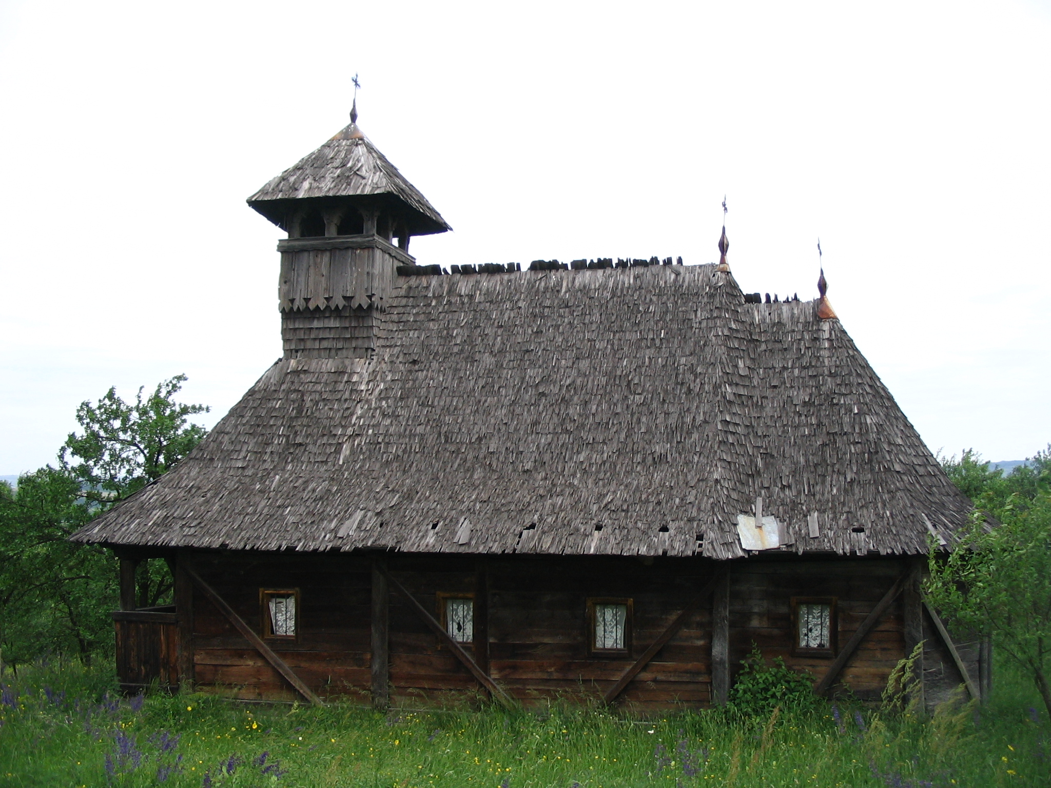 Biserica de lemn din Camăr, judeţul Sălaj. Autor: Bogdan Ilieş Data: mai 2006